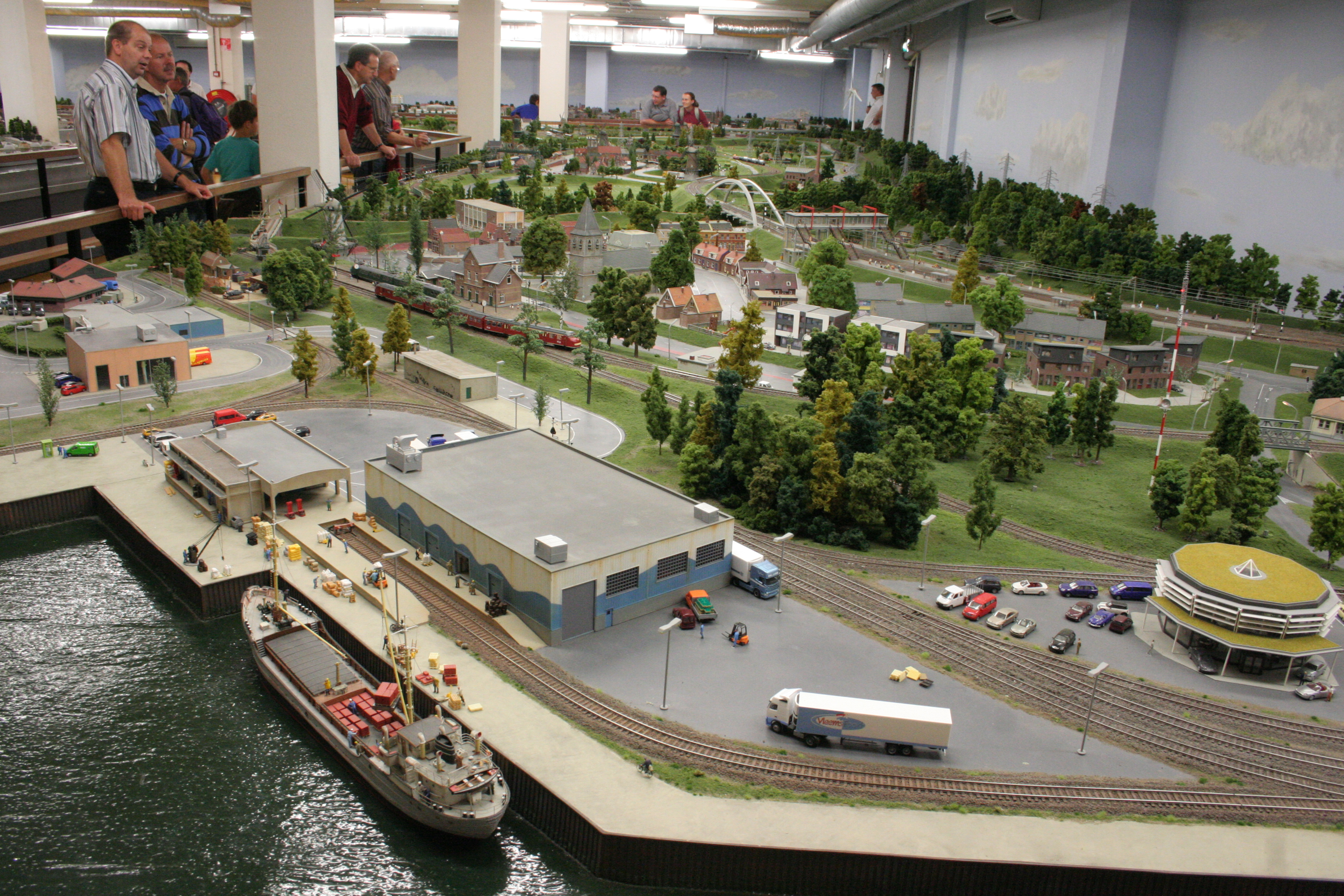 Railz Miniworld in Rotterdam